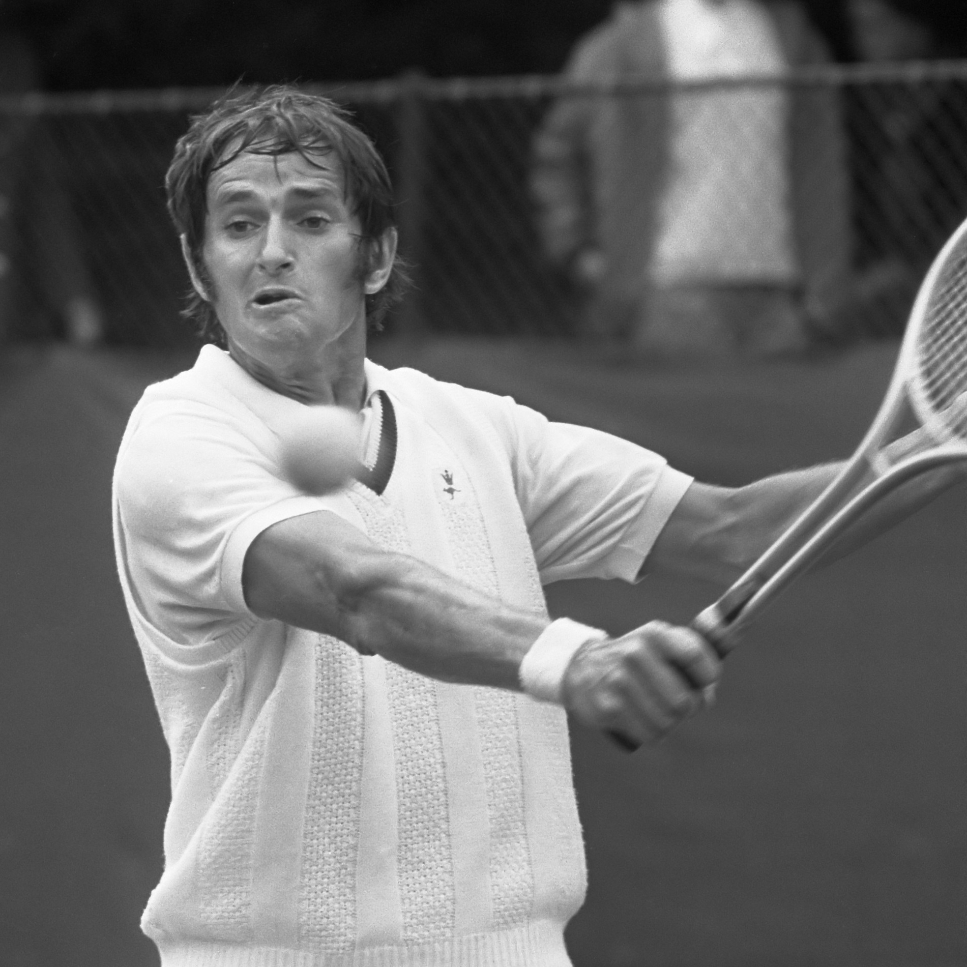 Internationale tenniskampioenschappen Melkhuisje te Hilversum, Mal Anderson in aktie 26 juli 1972